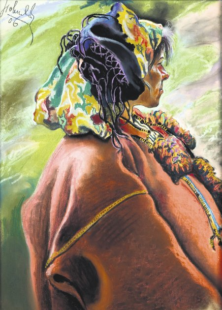 Казимир Сіхульський "Гуцулка"